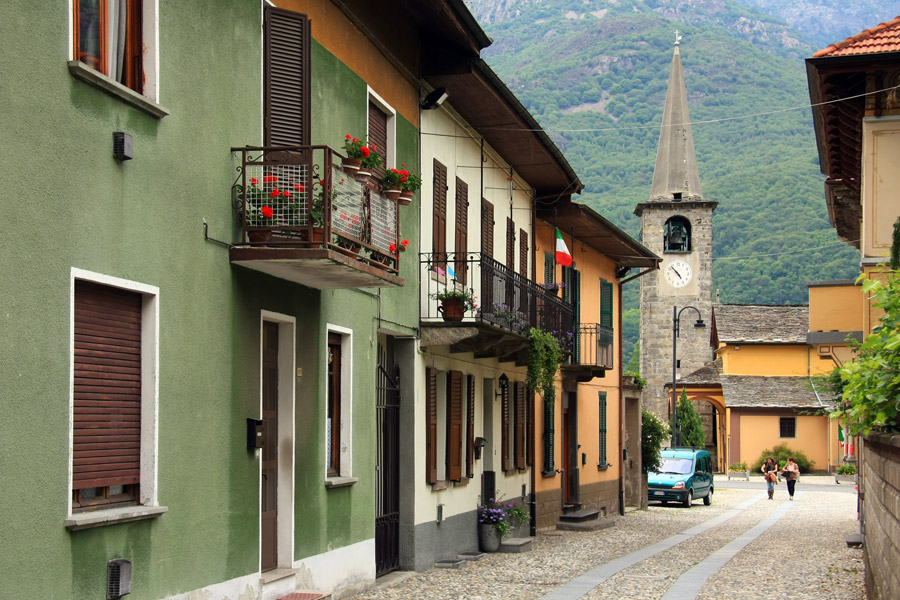 Veduta dell'abitato di Anzola d'Ossola (VB)